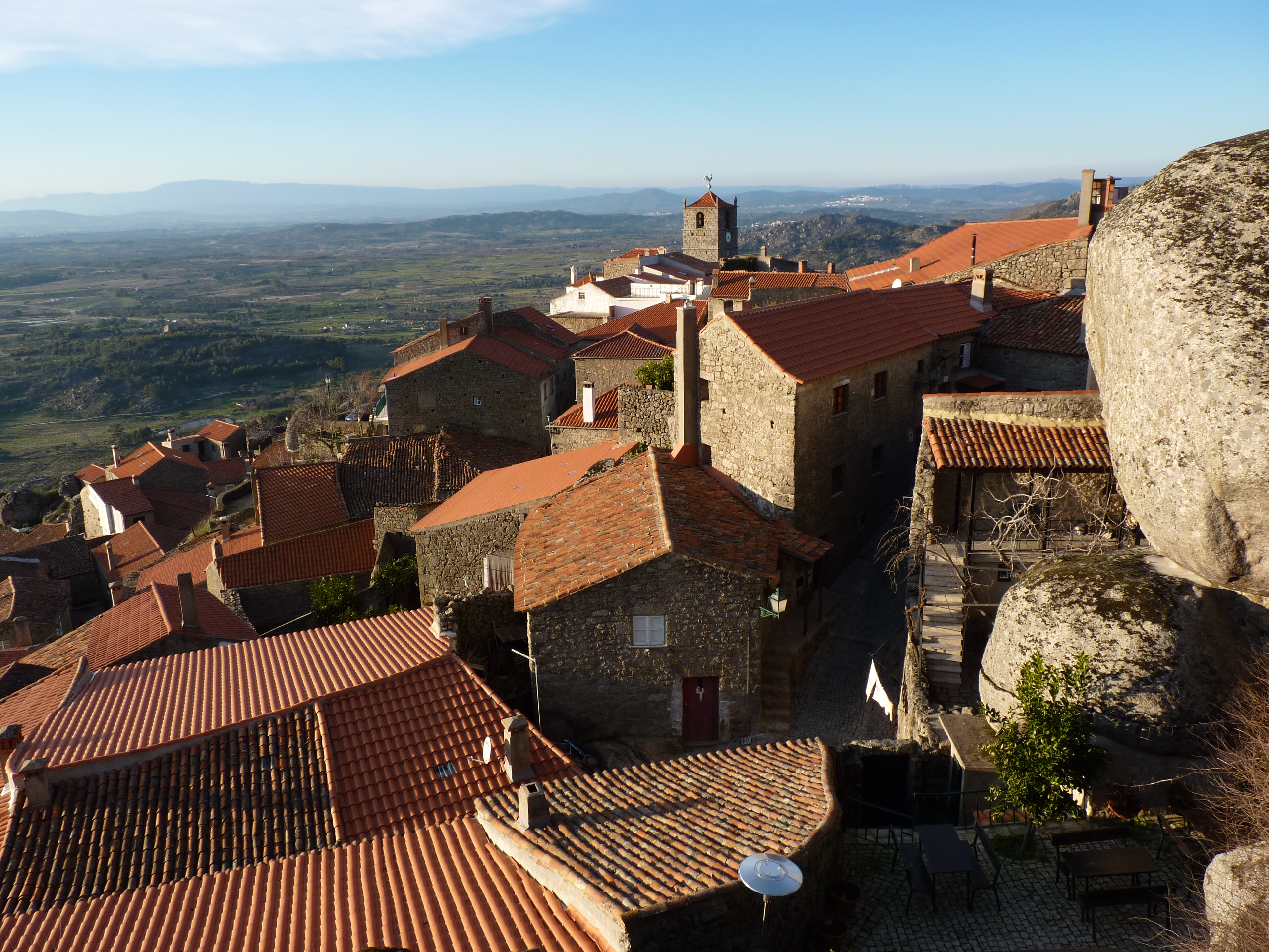 Aldeia Velha de Monsanto This monument is classified as Imóvel de Interesse Público. This file was uploaded for Wiki Loves Monuments in Portugal with the unique identifier 74233.